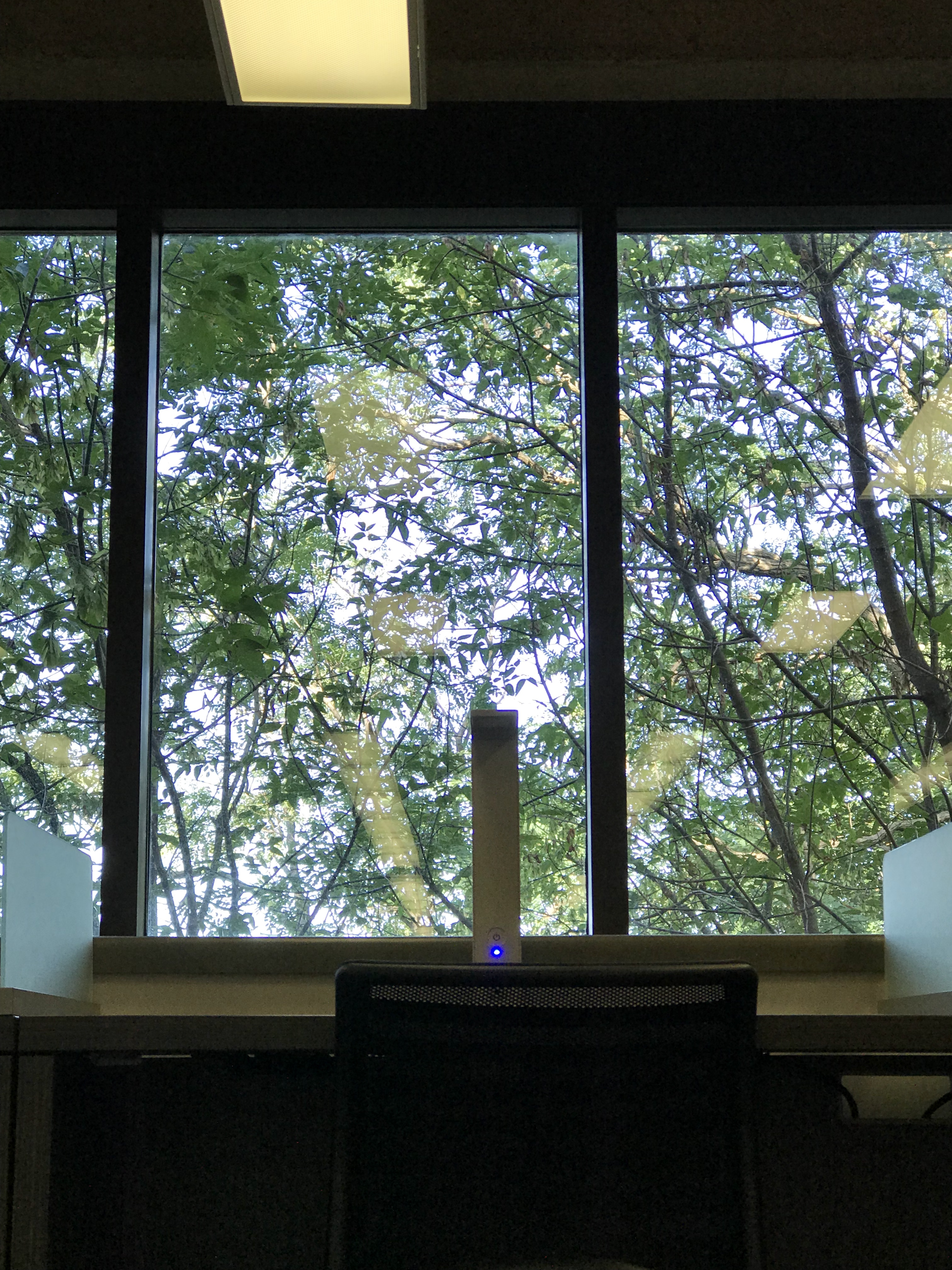 université de Montreal